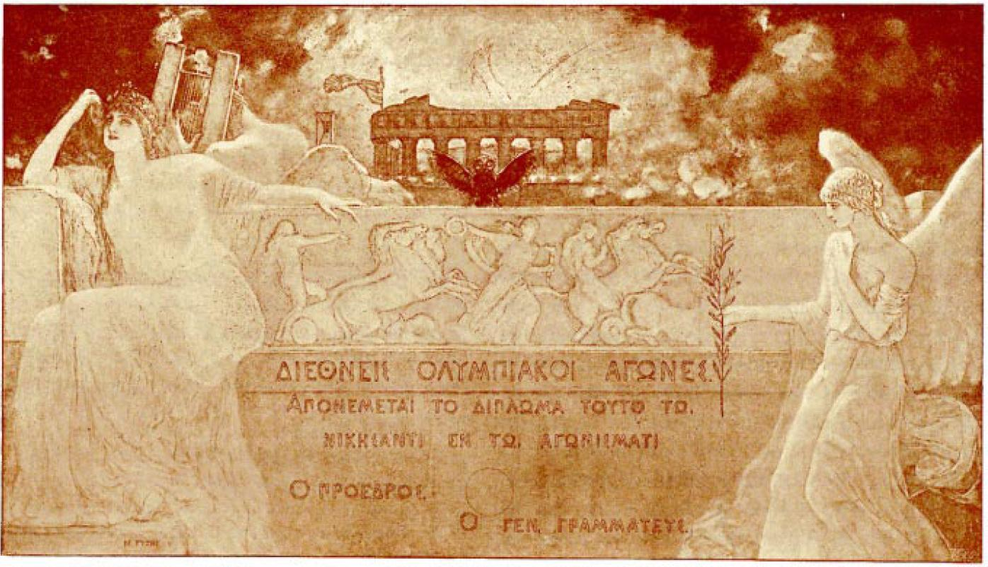 Siegerurkunde Olympische Spiele 1896